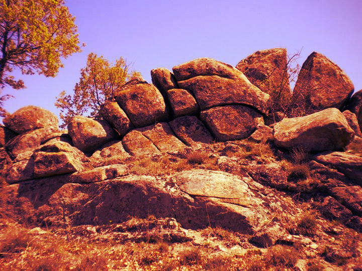 Мегалитно скално светилище "Св. Амина", село Мечкул, община Симитли